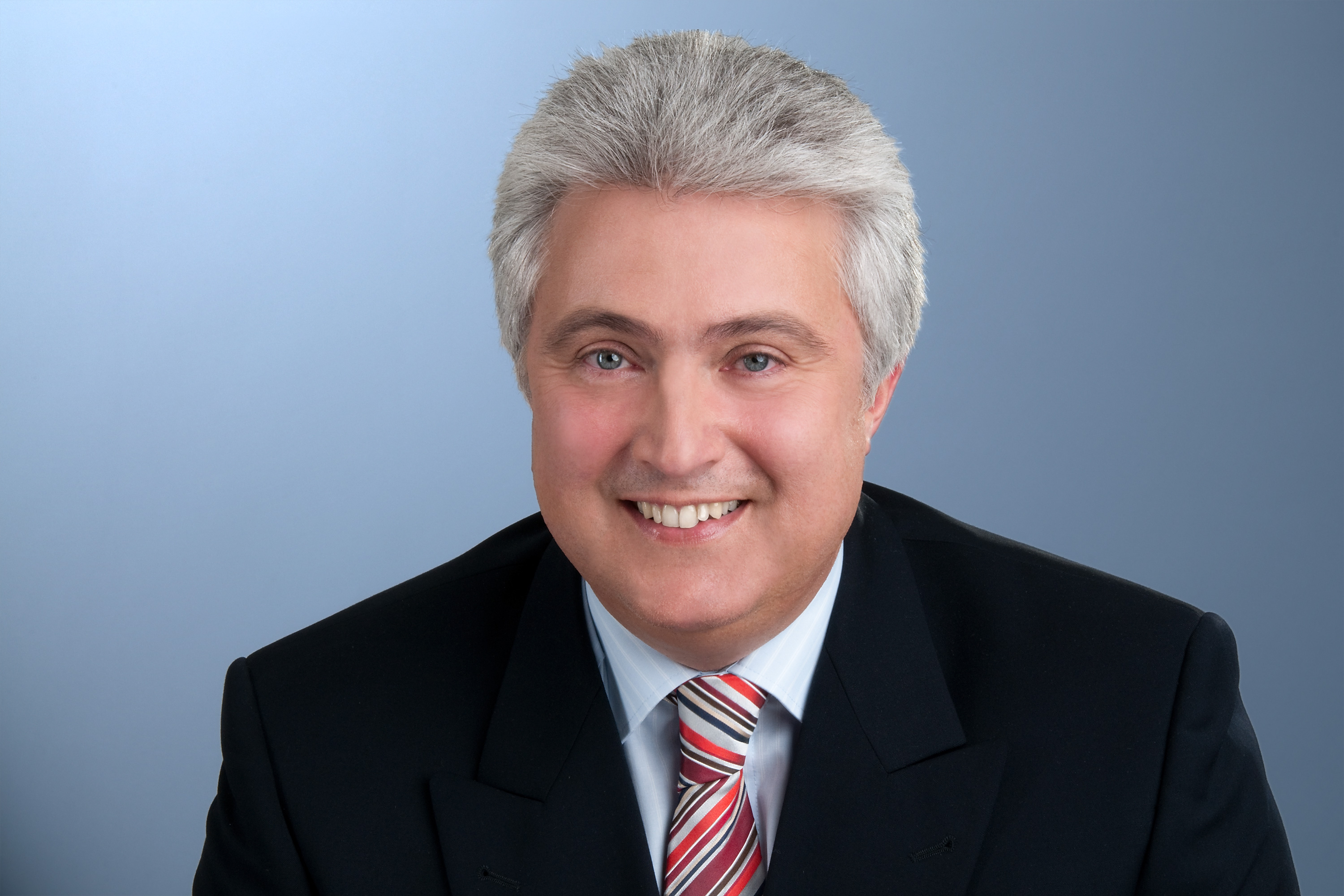 Prof. Dr. Franz-Josef Neumann.jpg